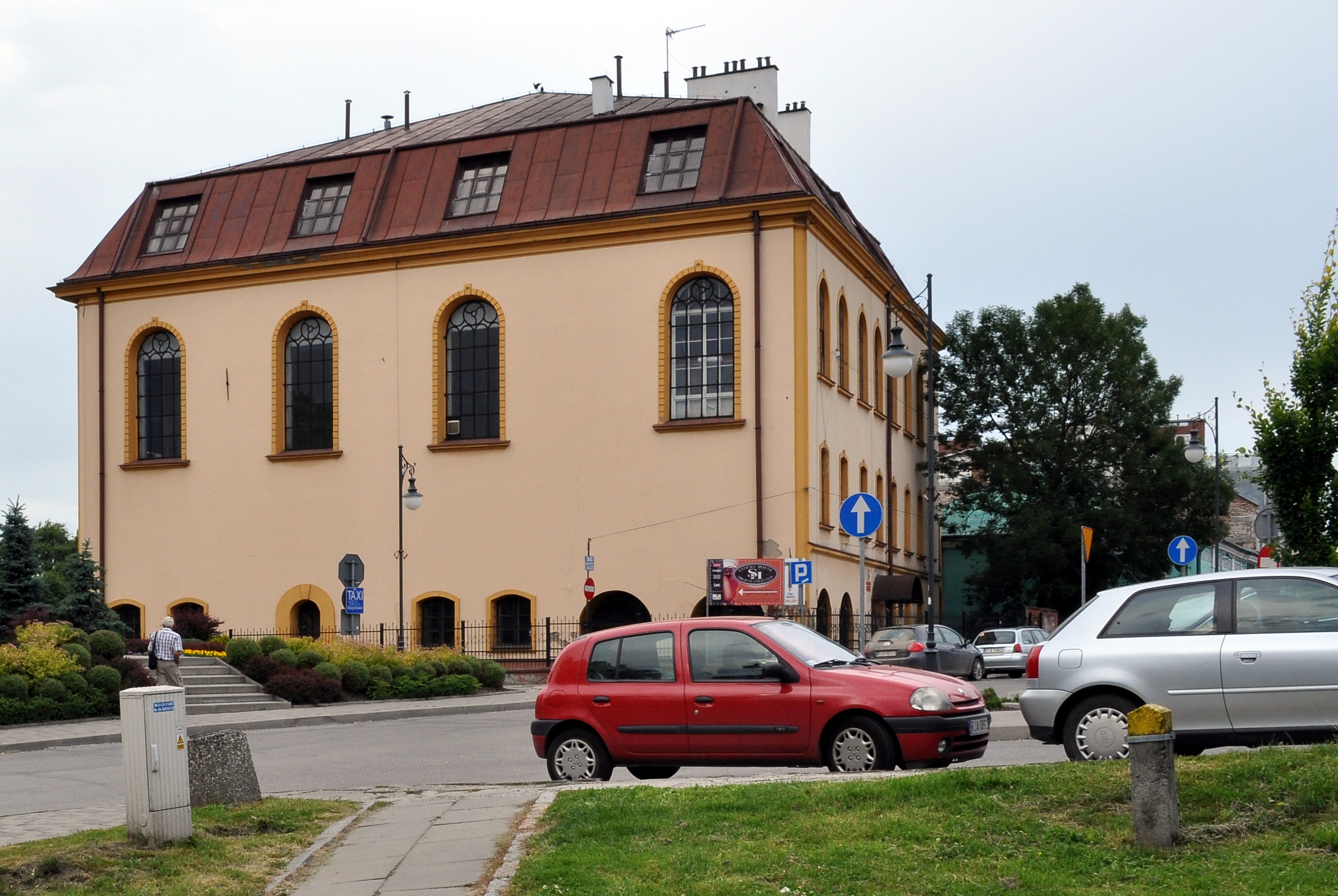 Duża Synagoga w Jarosławiu